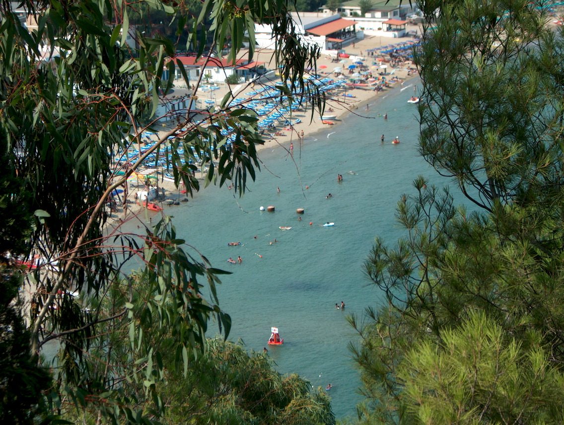 Baia di Copanello